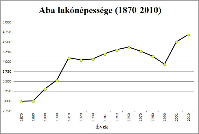 Aba lakónépességének grafikonja